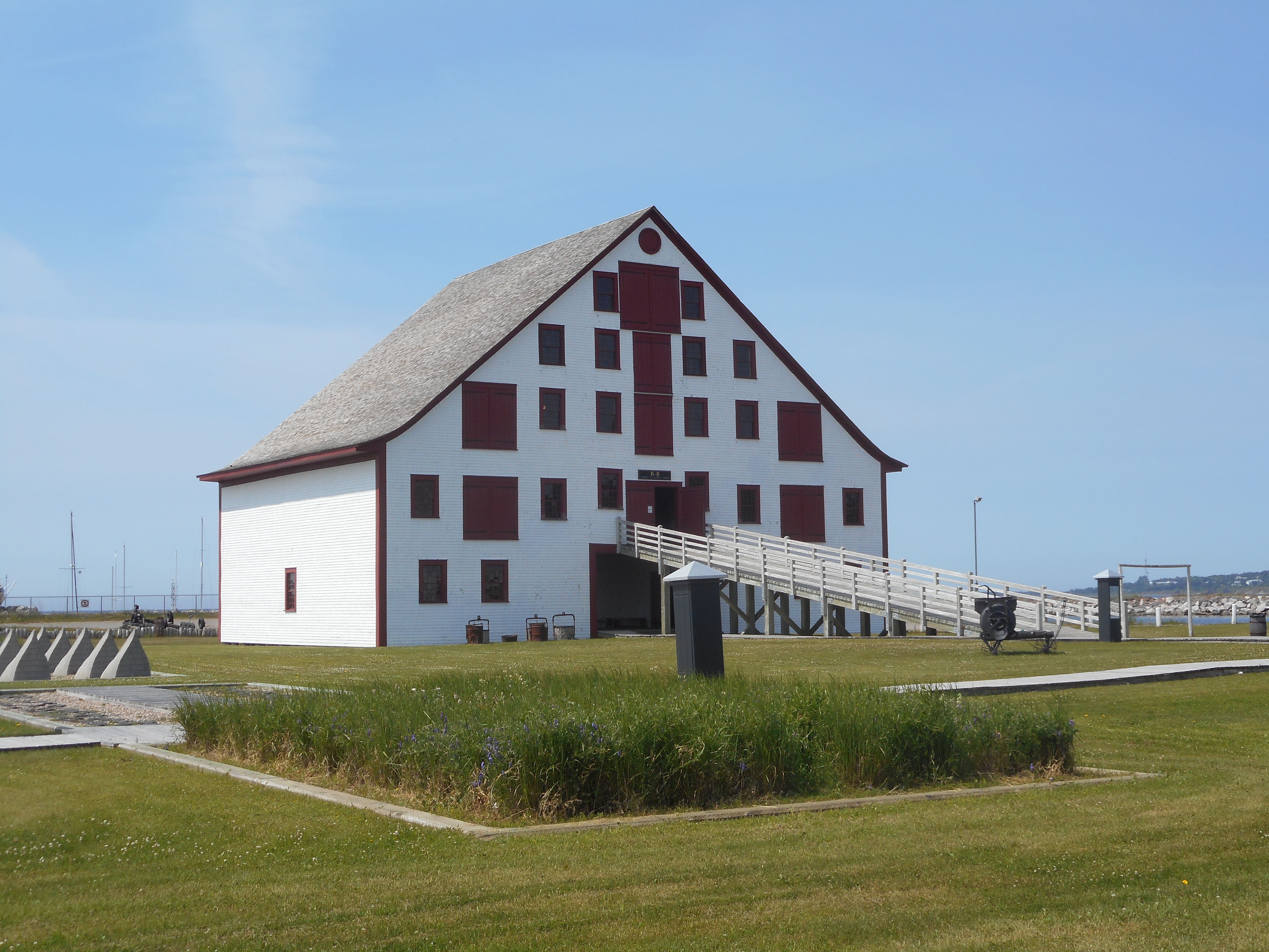 Site patrimonial du Banc-de-Pêche-de-Paspébiac, (autre nom: Site historique du Banc-de-Pêche-de-Paspébiac), 3e Rue, Paspébiac, Québec